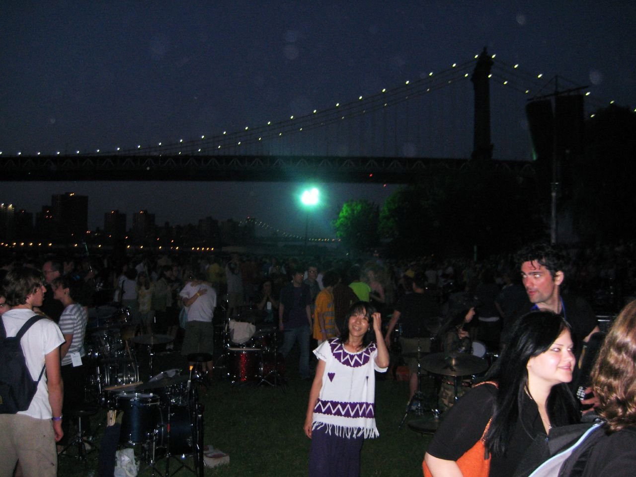 OH HI YOSHIMI (x__x)